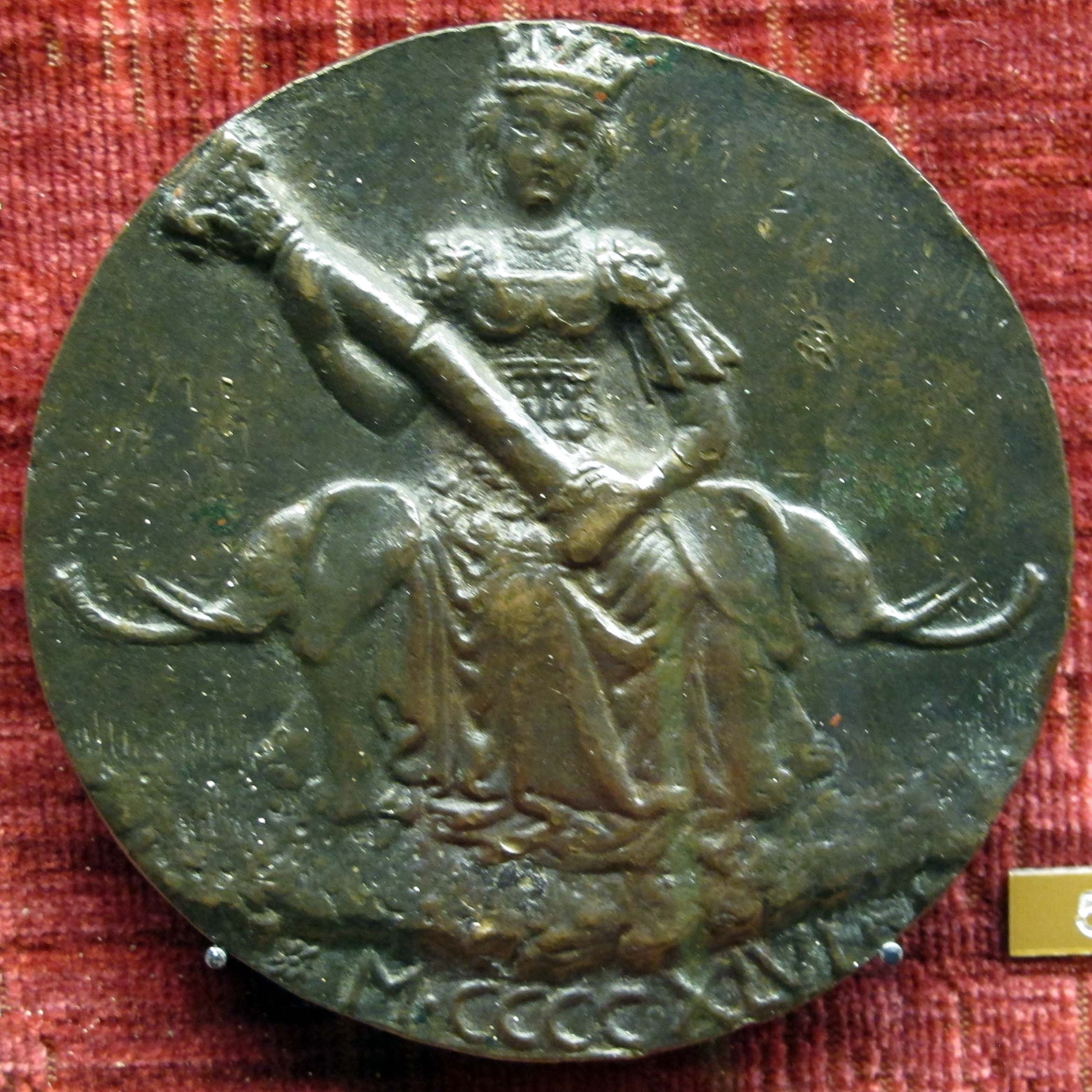 Matteo de' pasti, medaglia di sigismondo pandolfo malatesta con la Fortezza, verso 1446